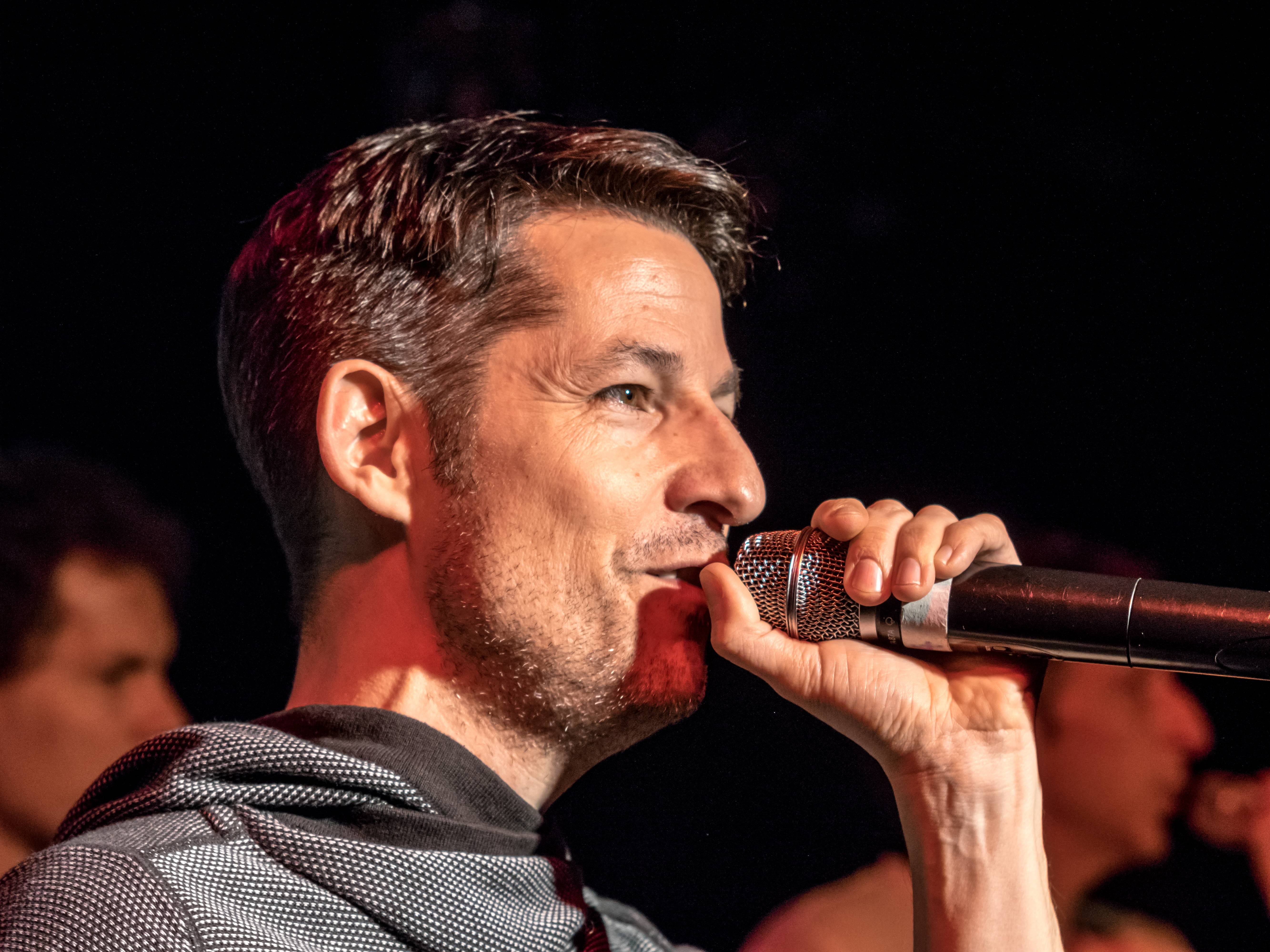 Bilder vom Konzert in Freiburg i. Br. Die A capella Gruppe Basta am 01. März 2015 Werner Adelmann